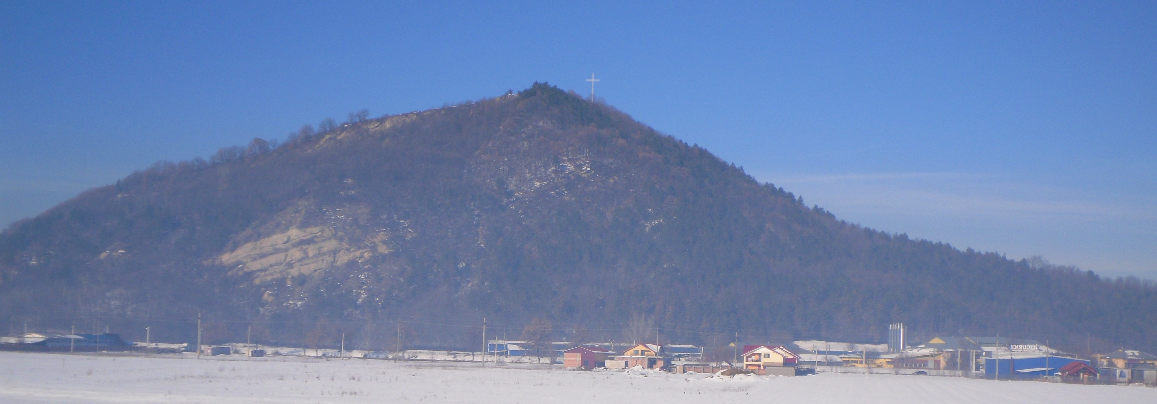 Dealul Perchiu fotografiat din parcul „Libertăţii” din Oneşti.